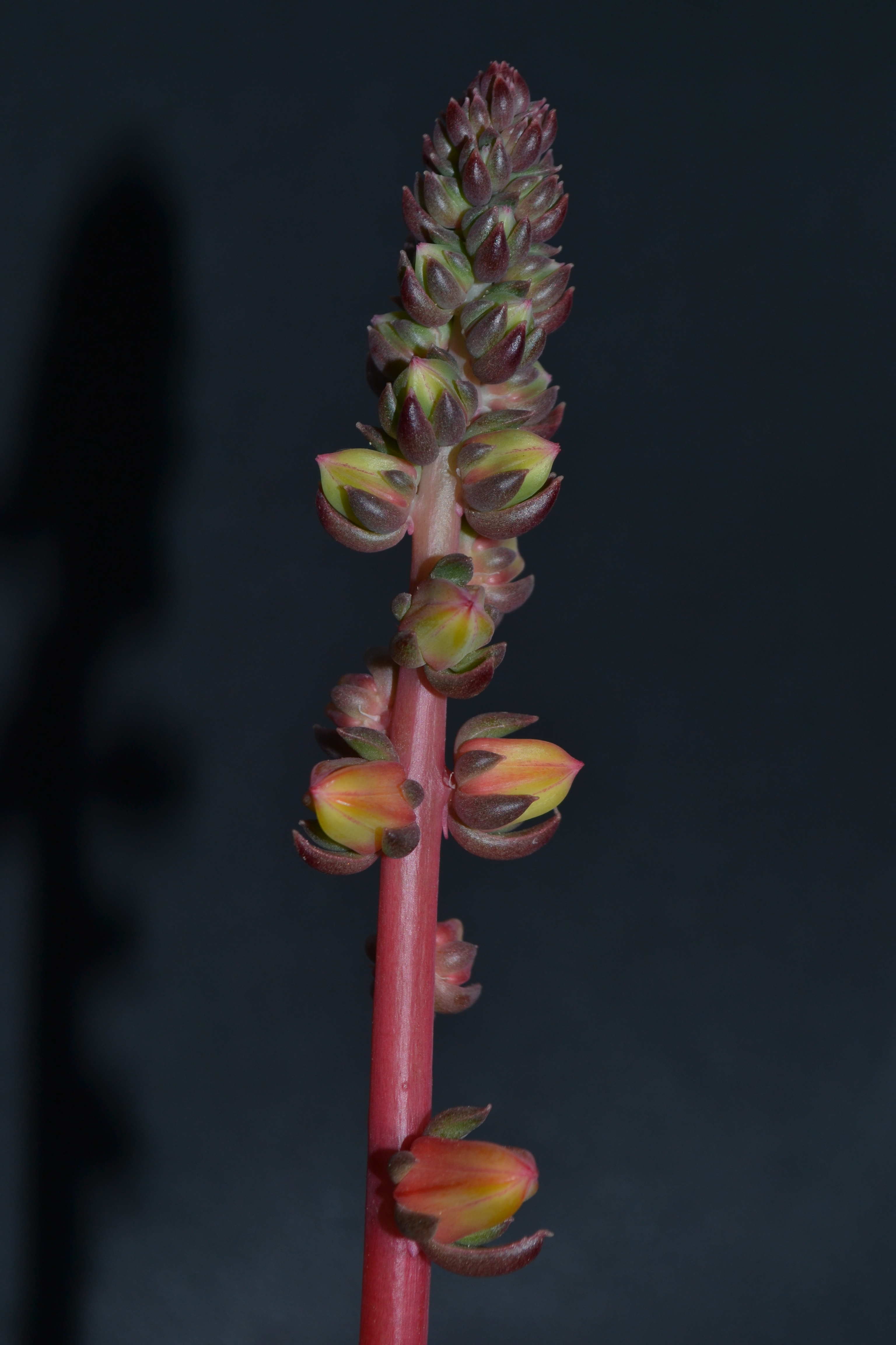 flor